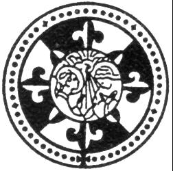 Emblema de las Religiosas Dominicas de la Anunciación, diseñado por el fundador Francesc Coll, con la cruz de Santo Domingo y una imagen de la Anunciación (originariamente, la orden se llamaba de la Encarnación)